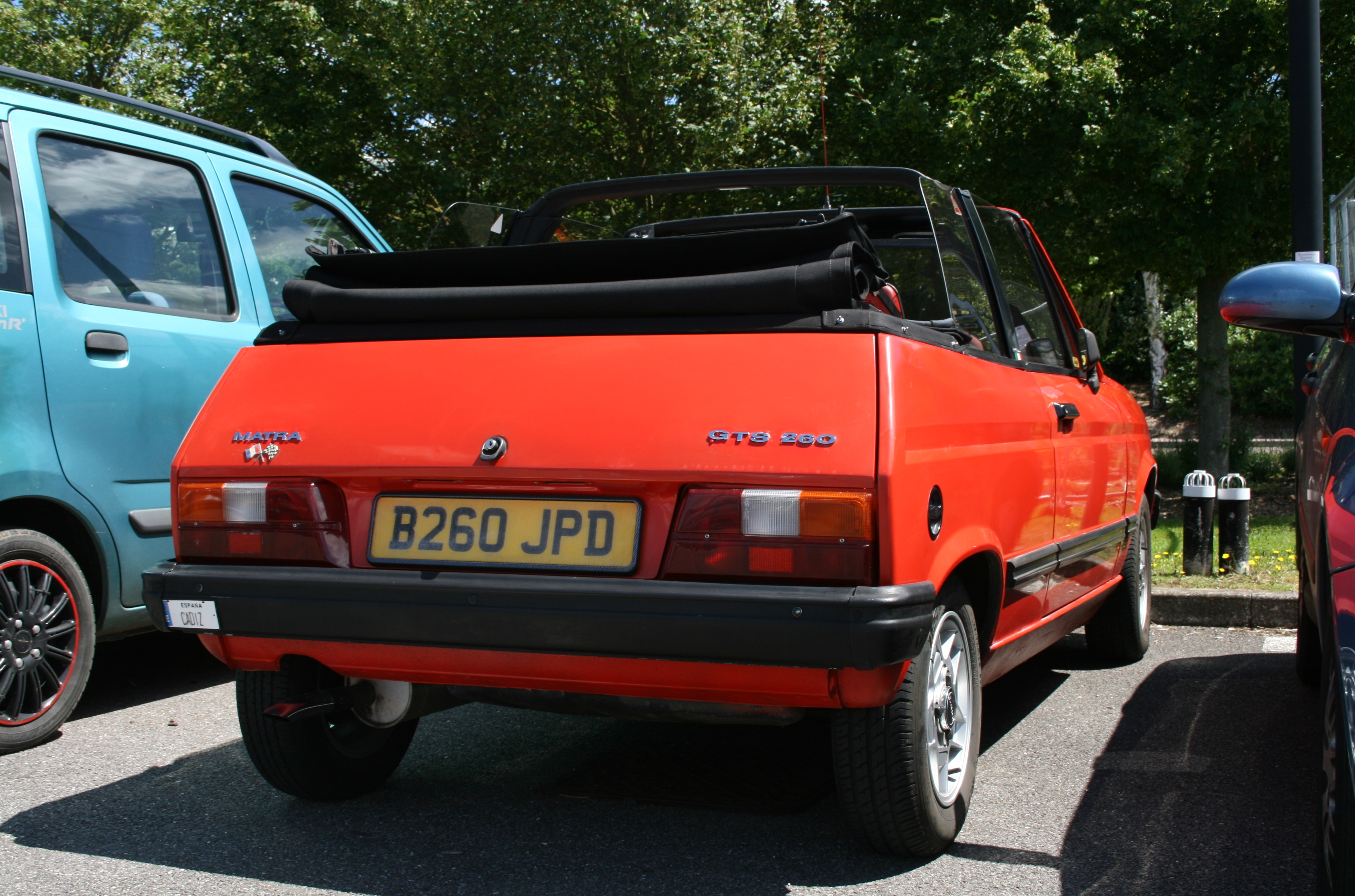 1984 Talbot Samba Cabrio